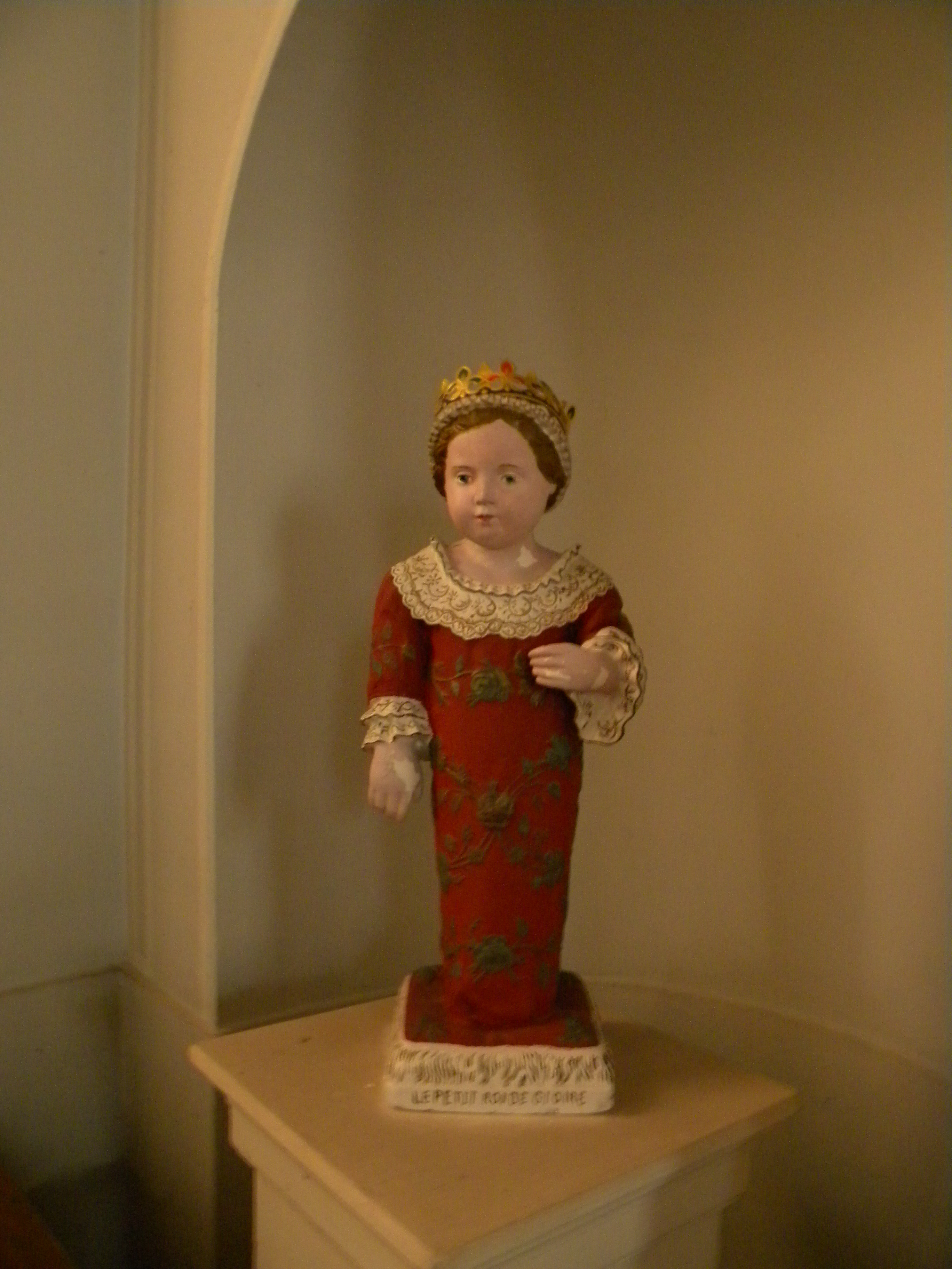 Eta reĝo en Sankta Usuge